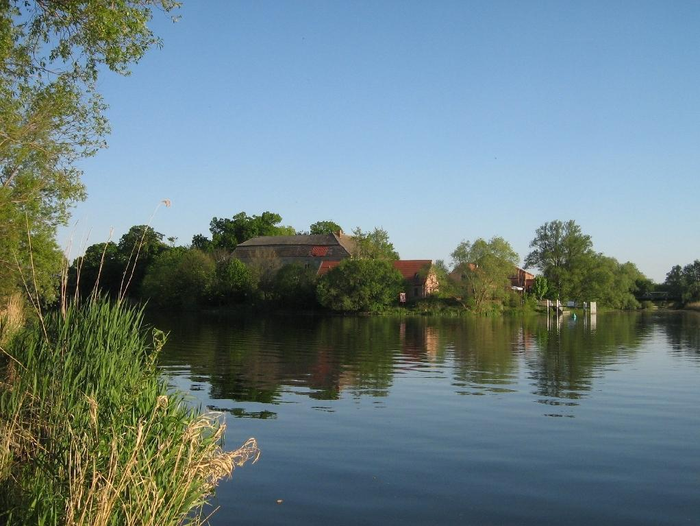 die Havel bei Milo, Gem. Havelaue (Brandenburg, Germany)